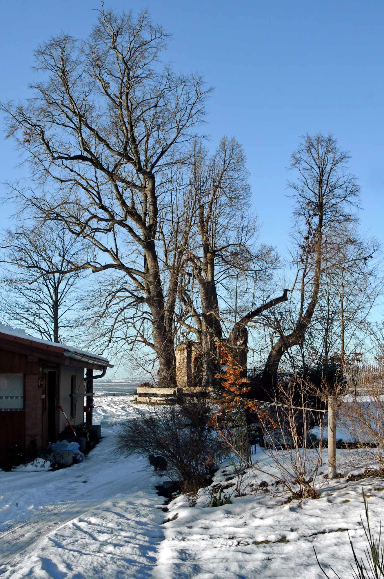 Kostelní Bříza, okres Sokolov, Slavkovský les, památné stromy - Lípy u Vondrů